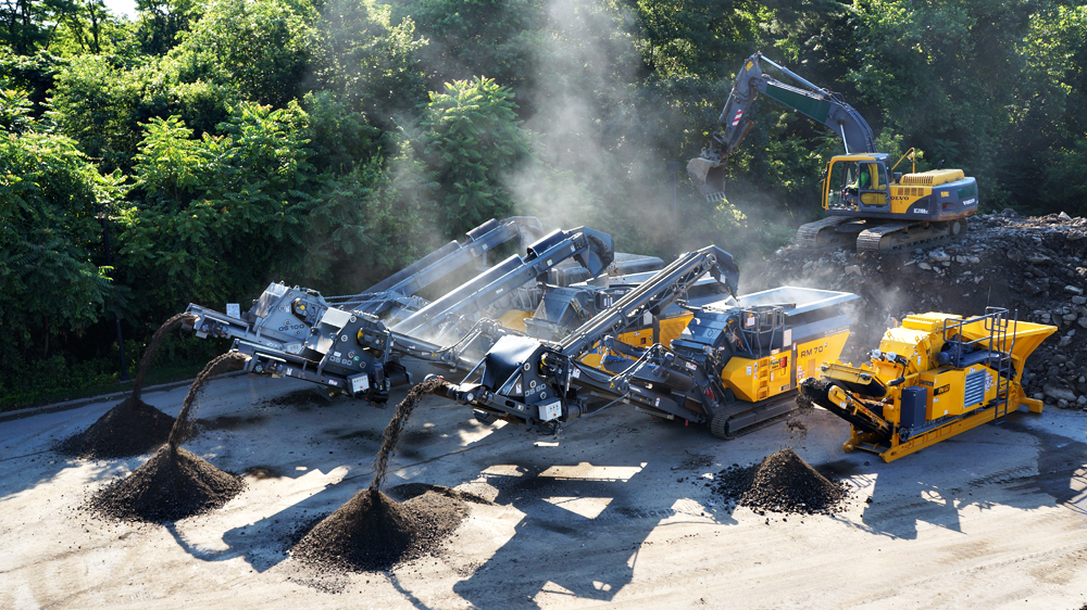 Mobile Brecher von Rubble Master